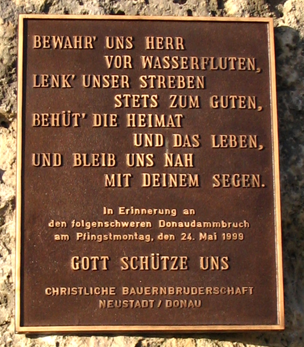 Pfingsthochwasser 1999 in Neustadt an der Donau, Landkreis Kelheim, Niederbayern: Inschrifttafel der an der ehemaligen Dammbruchstelle errichteten Gedenkstätte.